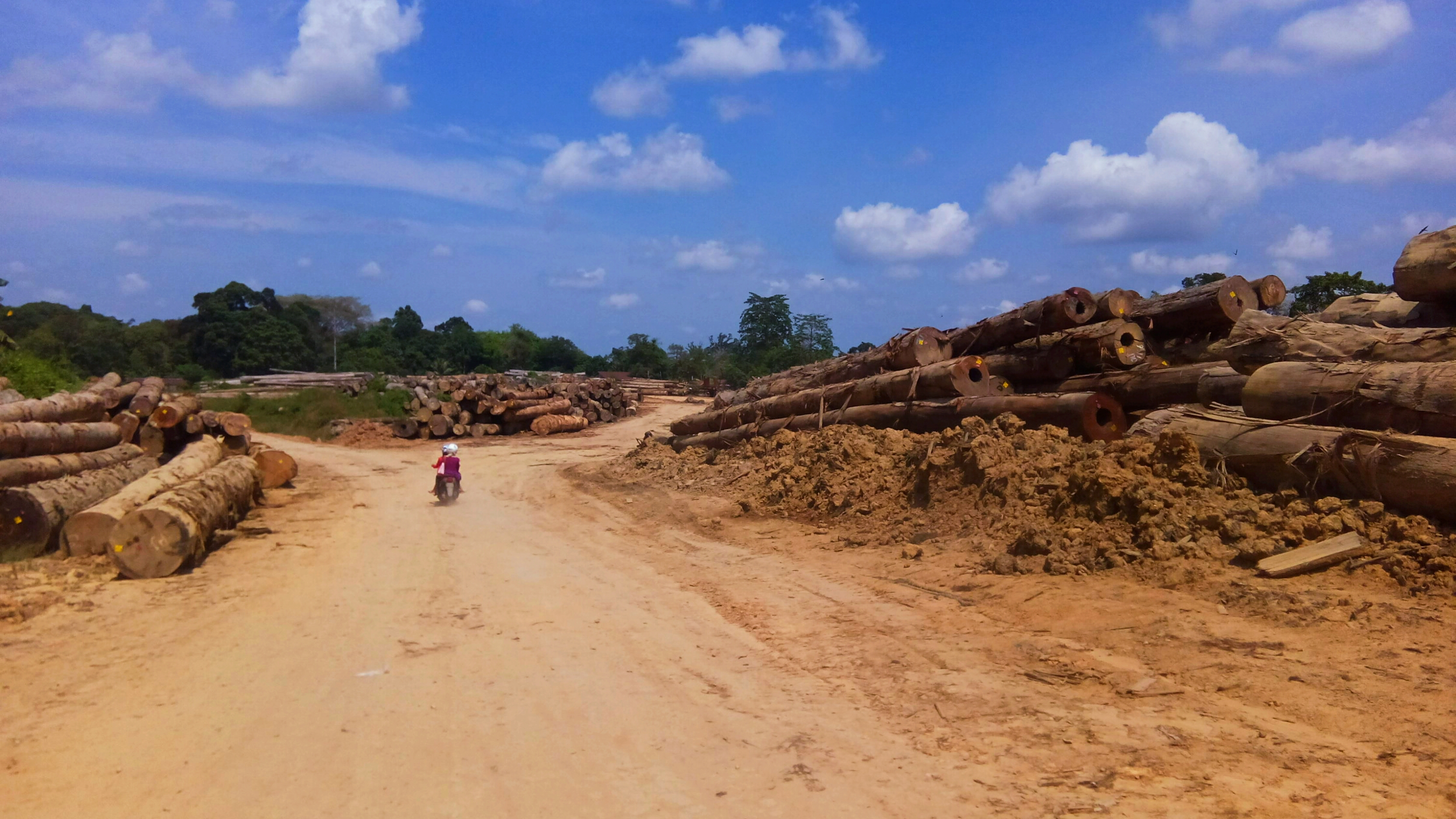 Merupakan salah satu panorama kekayaan alam hasil logging di Kabupaten Lamandau, dengan ukuran kayu yang dihasilkan sangat luar biasa besarnya. Gambar ini mencoba untuk "menegur" kita bahwa jangan sekali-kali terlena dengan hasilnya saja, tetapi juga tetap menjaga kelestariannya. Saatnya Indonesia memperhatikan Ekonomi Hijau nya.